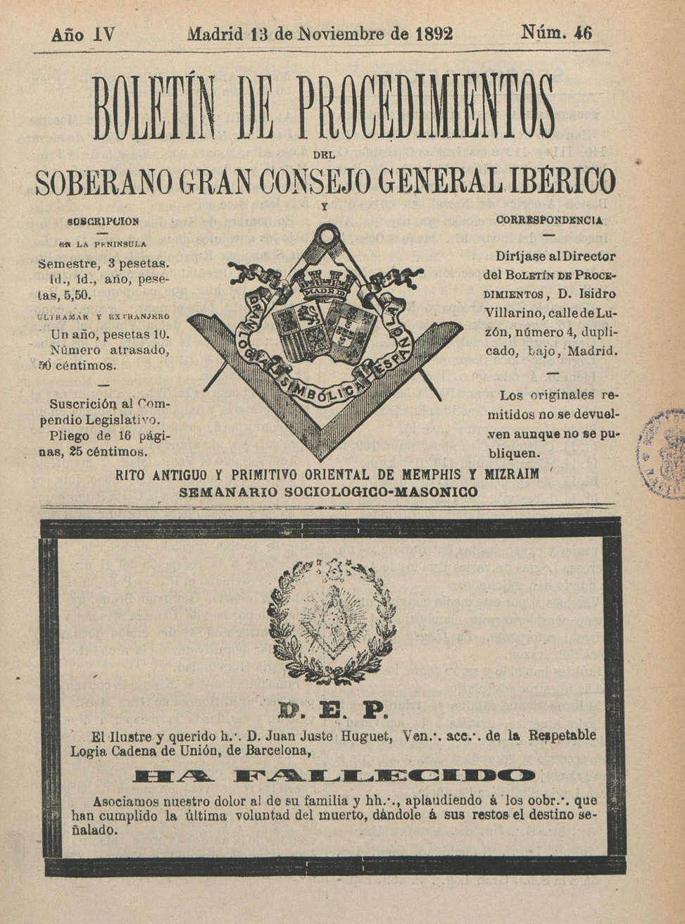 Esquela de Juan Justo Huguet (sic), venerable aceptado de la logia Cadena de Unión de Barcelona, publicada en el número 46 del Boletín de procedimientos del Soberano Gran Consejo General Ibérico 13 de noviembre de 1892. Madrid, Hemeroteca Digital. Biblioteca Nacional de España.